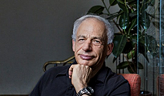 פרופסור למדעי המחשב שמעון אולמן